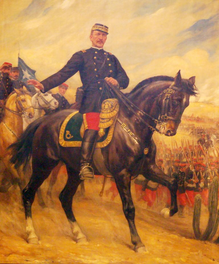 Manuel Jesús Baquedano González (Santiago; 1 de enero de 1823 - † 30 de septiembre de 1897), fue un militar y presidente chileno, comandante en jefe del Ejército durante la Guerra del Pacífico.